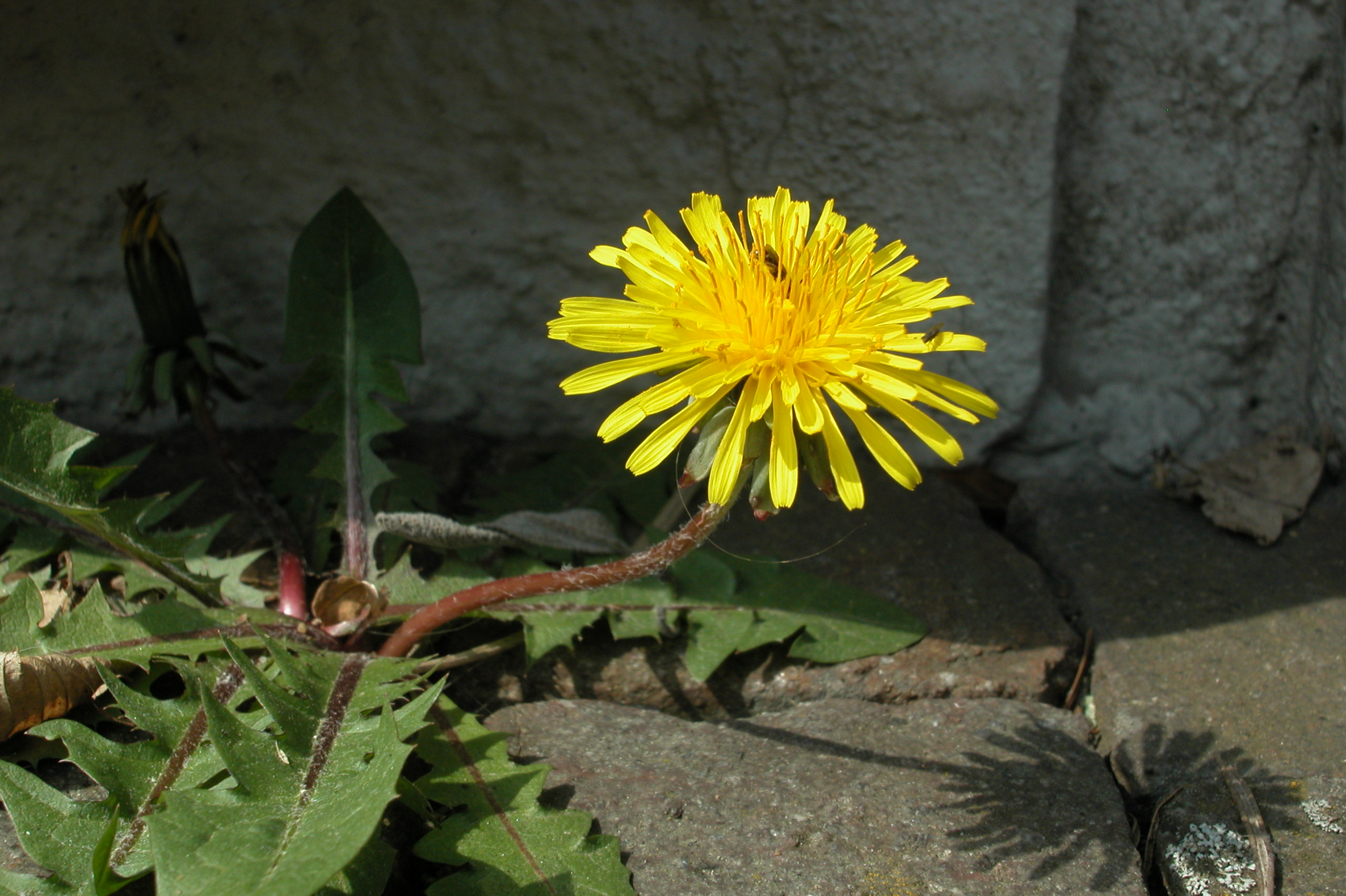 Löwenzahn in einer Plattenfuge